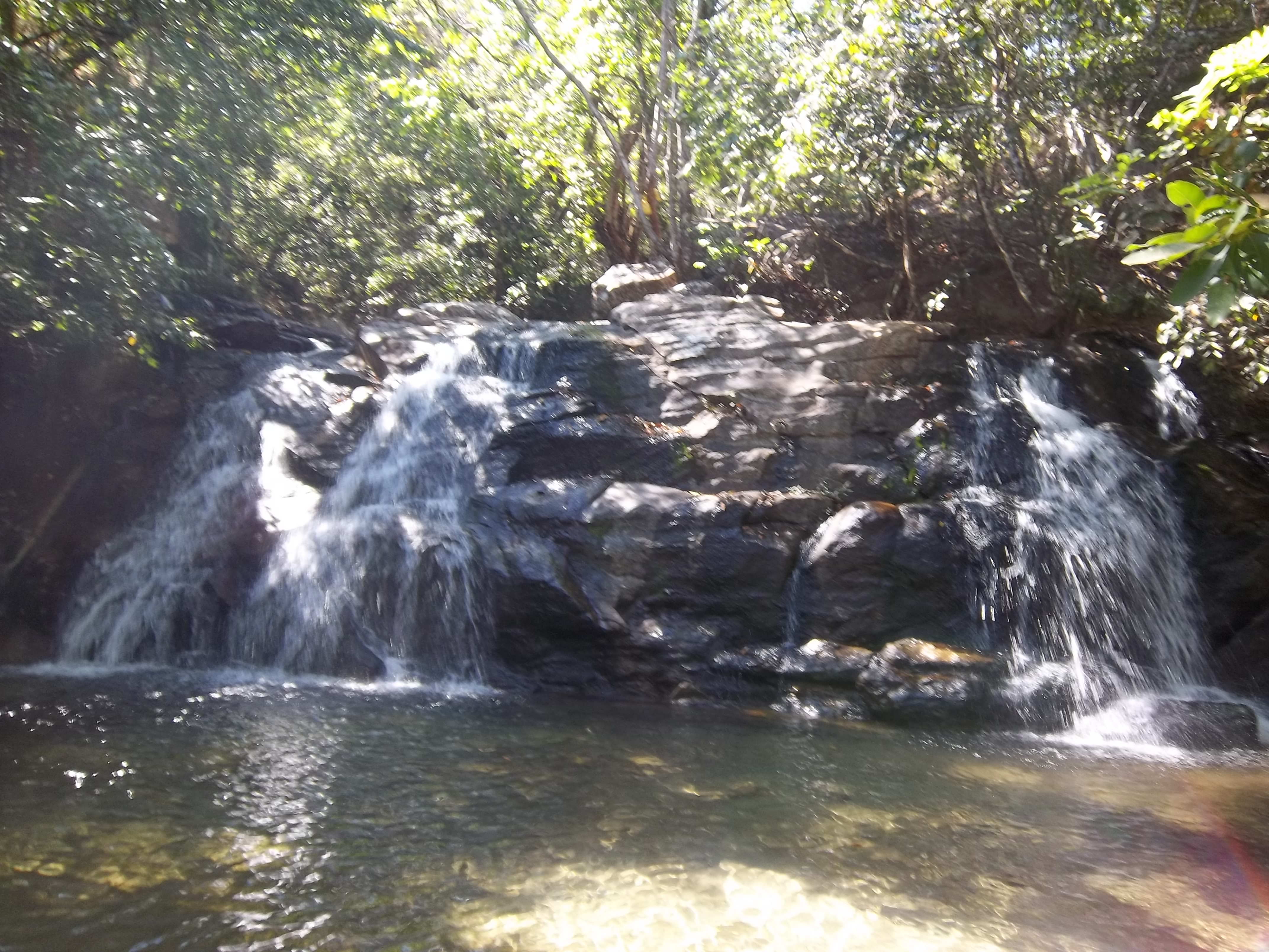 Cachoeira Açude na Fazenda Bonsucesso em Pirenópolis.